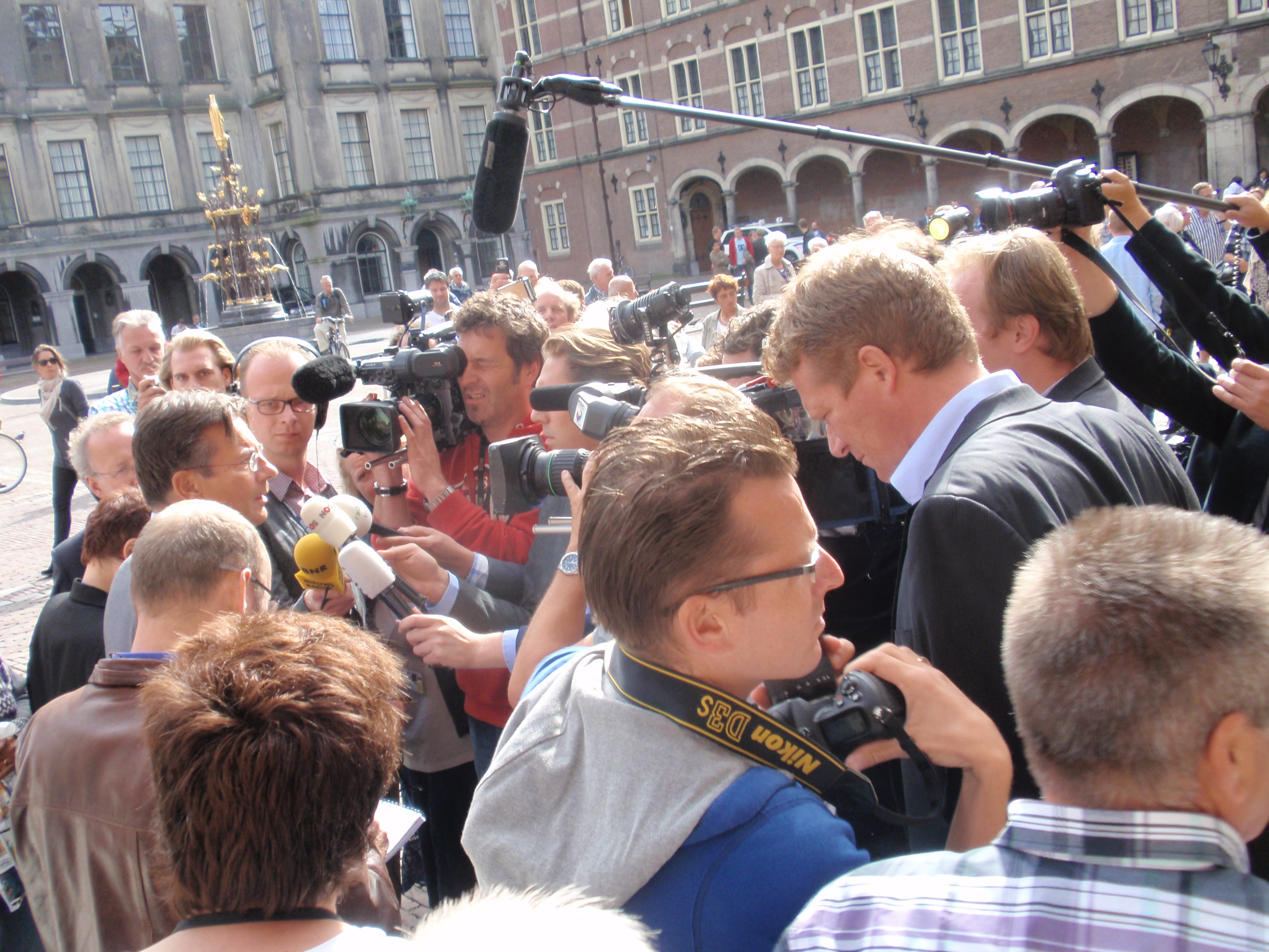 Maxime Verhagen wordt tijdens de kabinetsformatie 2010 kort na het heraanstellen van Ivo Opstelten als informateur bestormd door de pers bij zijn wandeling van het Ministerie van Buitenlandse Zaken naar het Eerste-Kamergebouw.